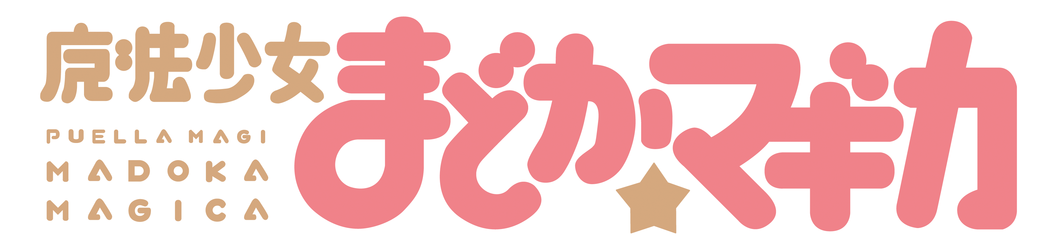 Logo des Animes Mahō Shōjo Madoka Magika